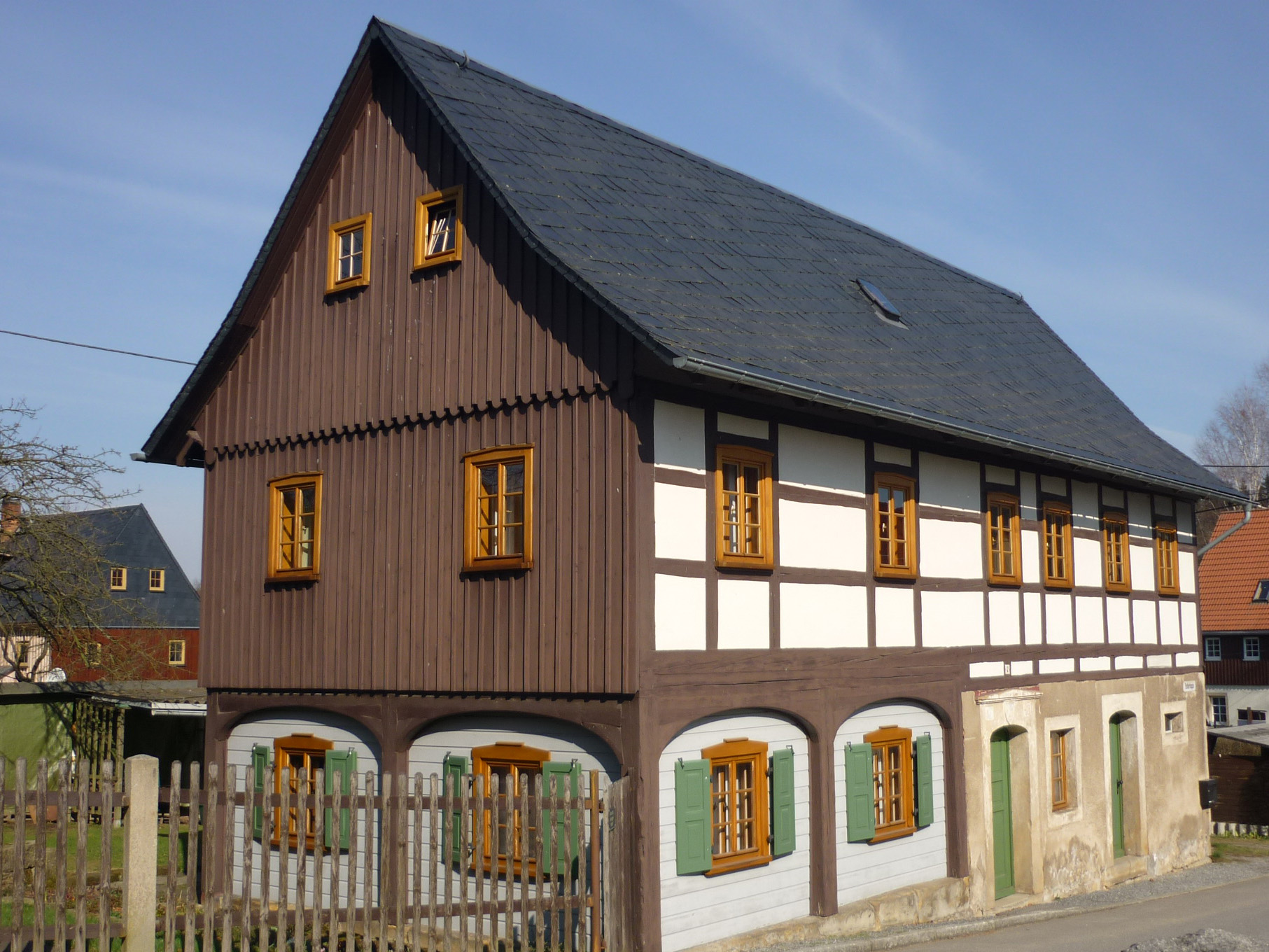 Umgebindehaus in Ottendorf (Kirnitzschtal), Endlerkuppe Nr. 7